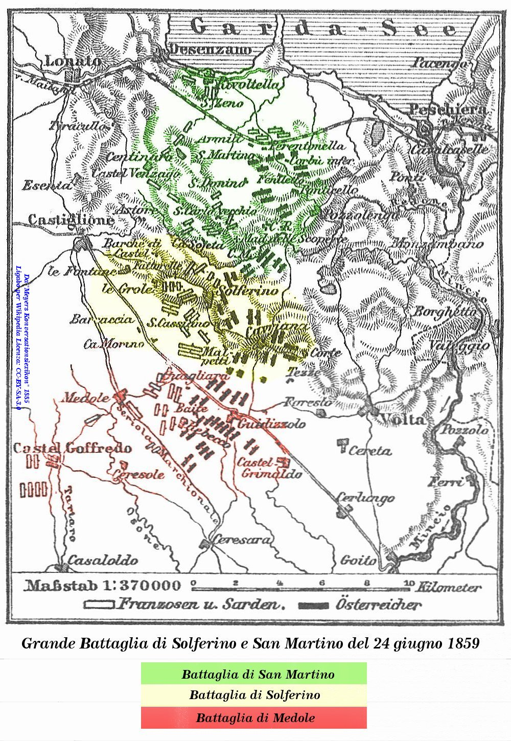 Localizzazione delle tre principali battaglie che composero la Grande Battaglia di Solferino e San Martino del 24 giugno 1859, sulla base di cartina ottocentesca PD. Viene rappresentata la situazione dopo l'8ª ora di combattimenti, alle 12 a.m. circa.